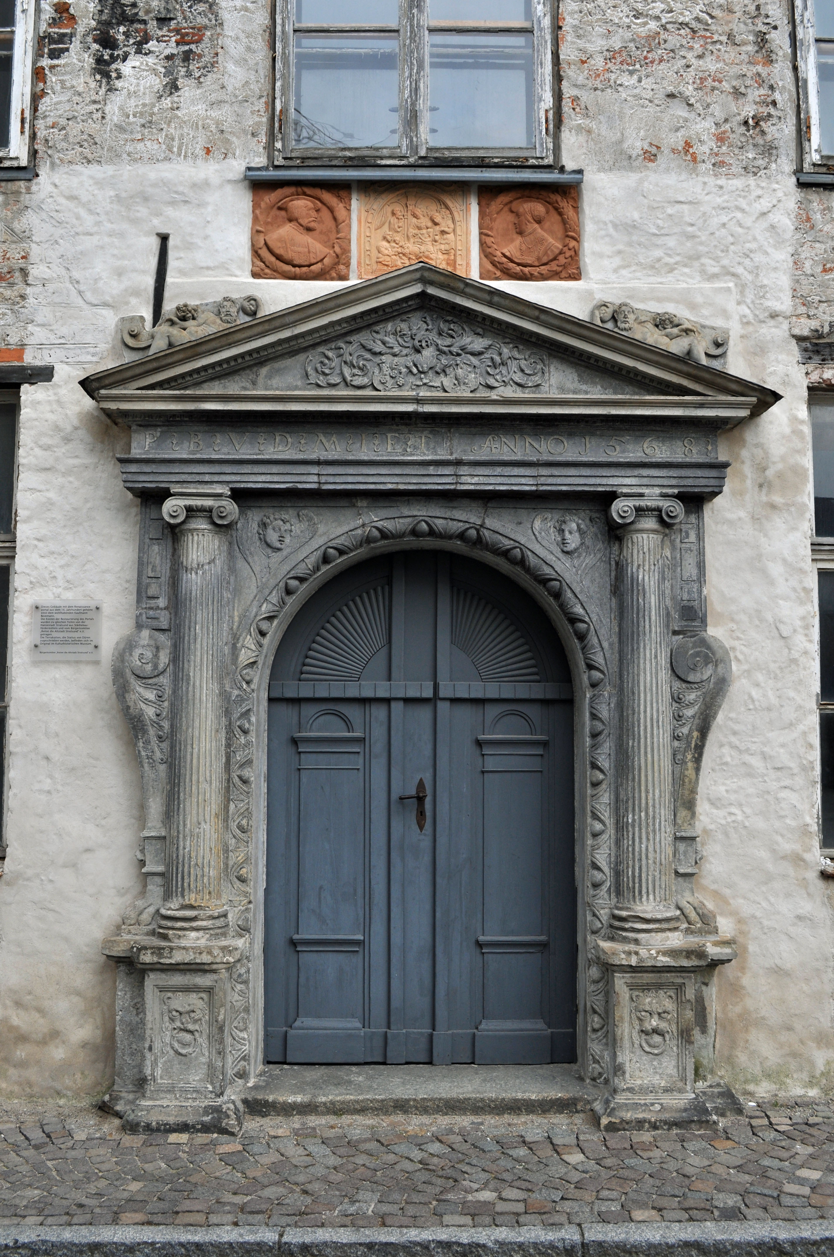 Gebäude bzw. Gebäudedetail in Stralsund. Straße und Hausnummer siehe Dateiname.